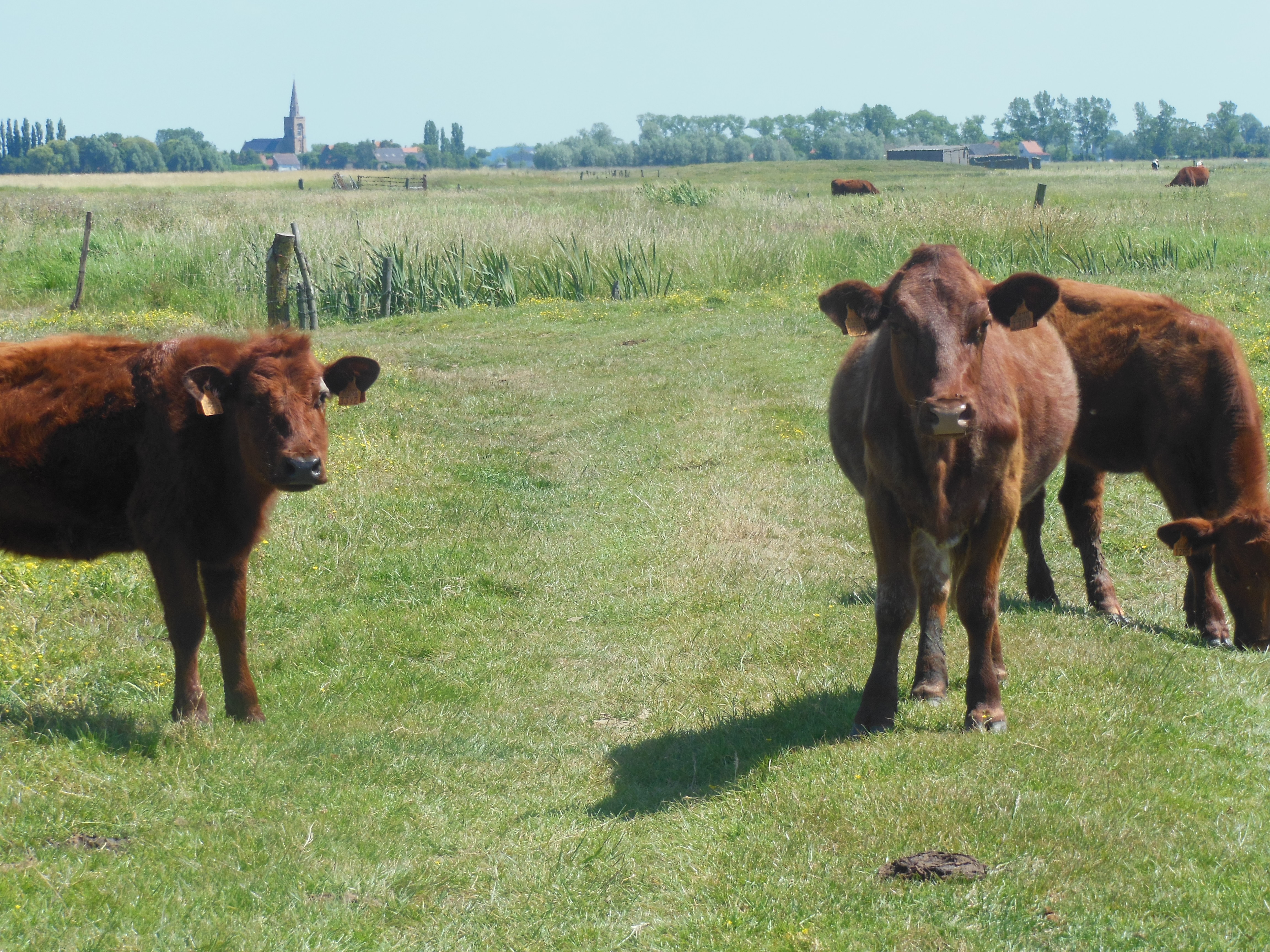 Typisch landschap van de komgronden van Lampernisse met kalveren van het “West-Vlaams rood” ras.Het West-Vlaams rood ras is een erkend streekproduct. Het werd en wordt ook “Kasselkoeien” genoemd.